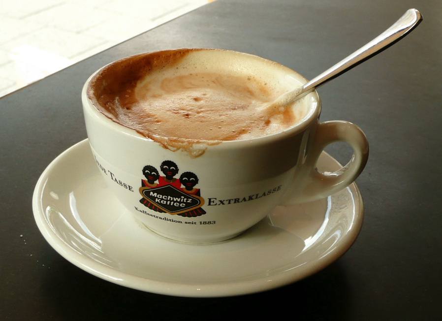 Machwitz Cappucino